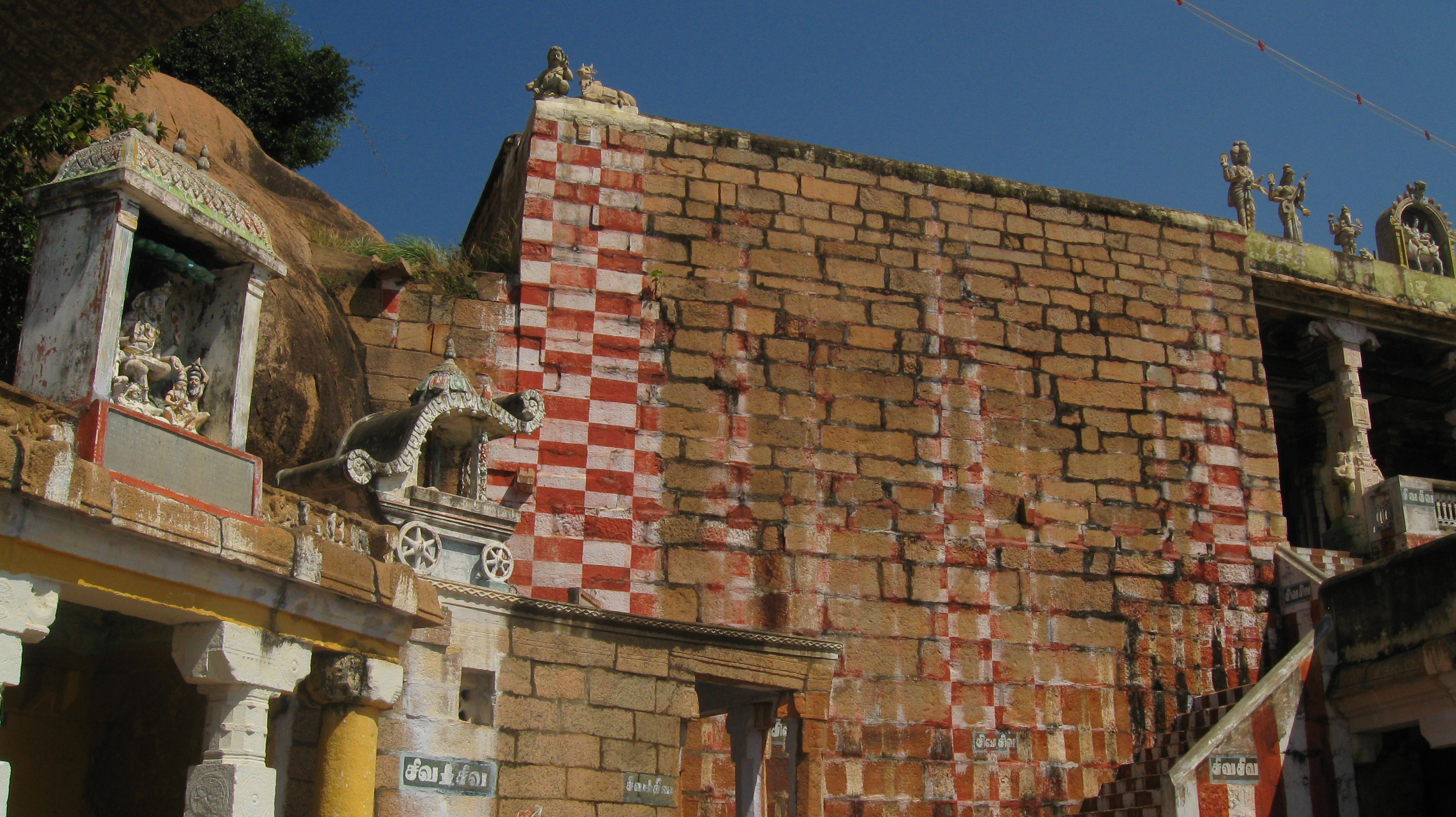 வரலாற்றுப் புகழ்மிக்க திருக்கொடுங்குன்றம் என்னும் பிரான்மலையின் ஒருபுறத் தோற்றம்